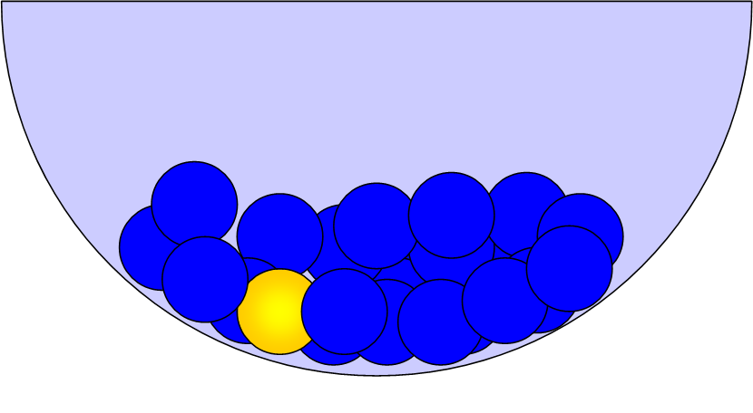 ballenbak tijdens 1e finale lingo